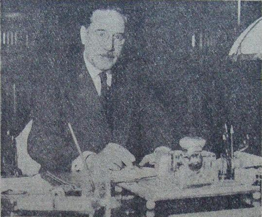 Emilio P. Siri, intendente de la ciudad de Buenos Aires (Argentina) entre 1946 y 1949.